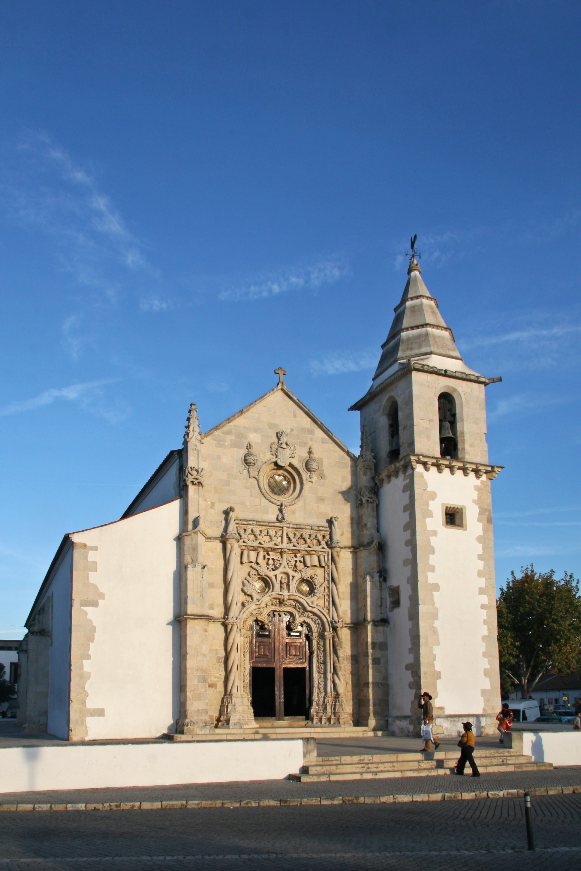 Kirche Matriz da Golegã in Golegã (Portugal) mit Portal im manuelinischen Stil